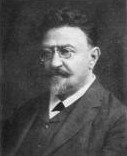 Josef Král (1853 - 1917), Český klasický filolog a univerzitní profesor.